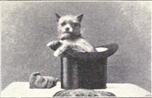 Affenpinscher (Monkey Terrier) from 1915